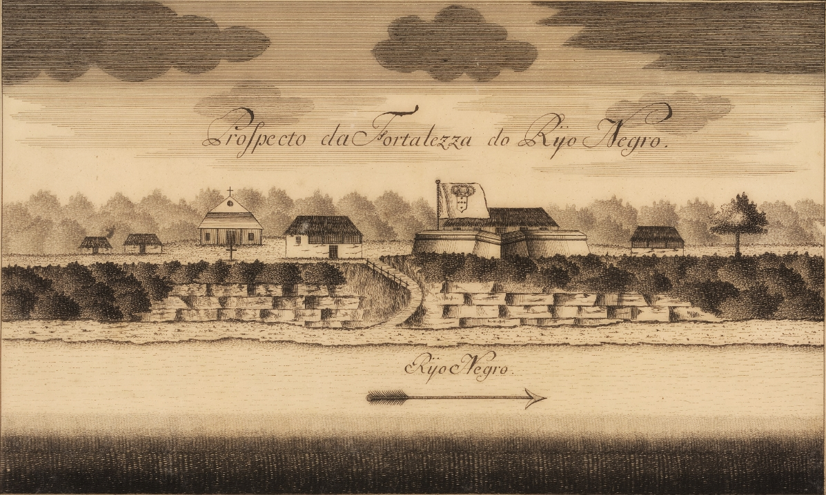 Coleção dos prospectos das aldeias, e lugares mais notáveis que se acham em o mapa que tiraram os engenheiros de expedição principiando da cidade de Manaus.